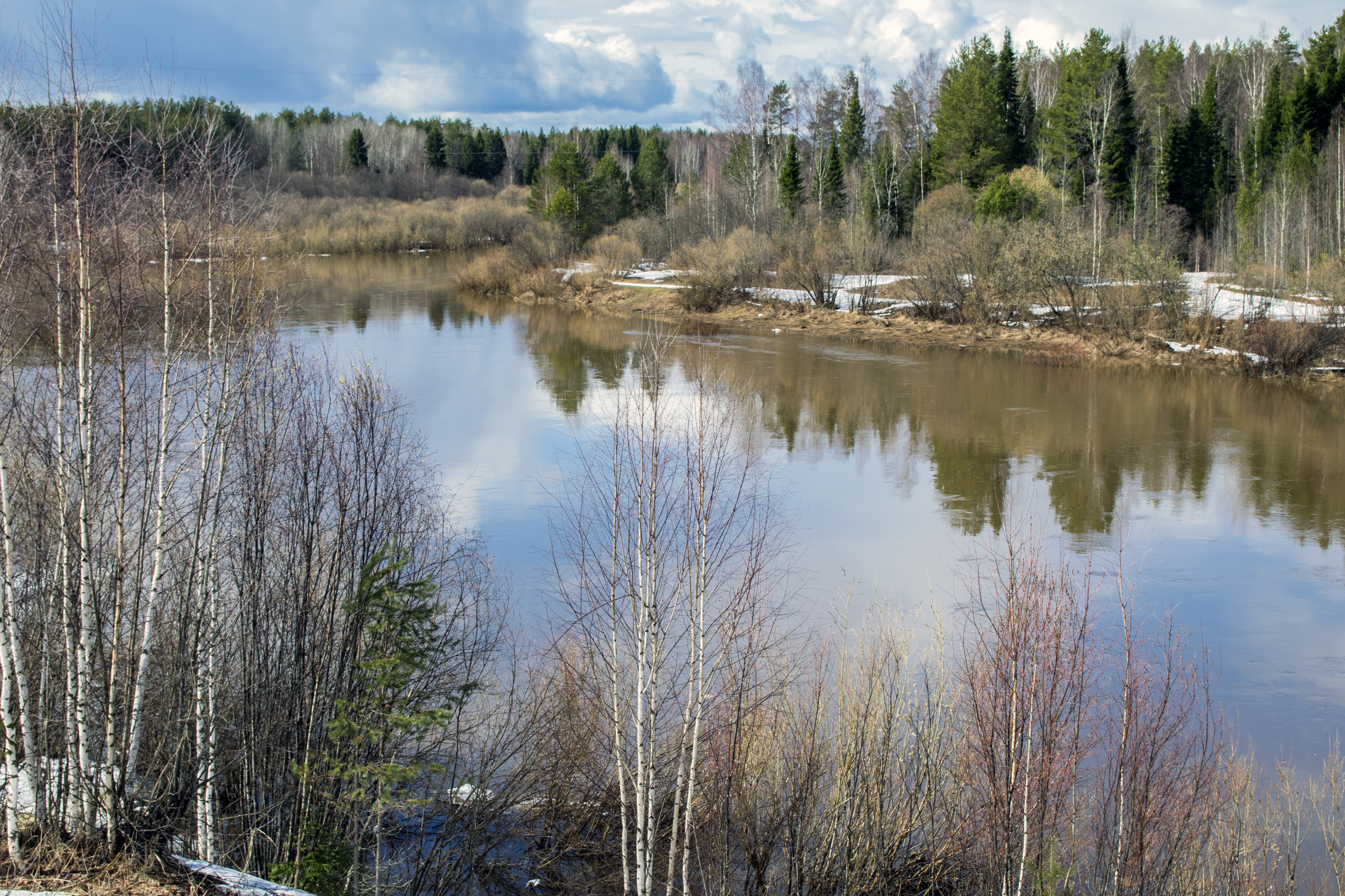 Река Летка в Слободском районе Кировской области This image has been uploaded for Wikivoyage travel guide on Кировская область